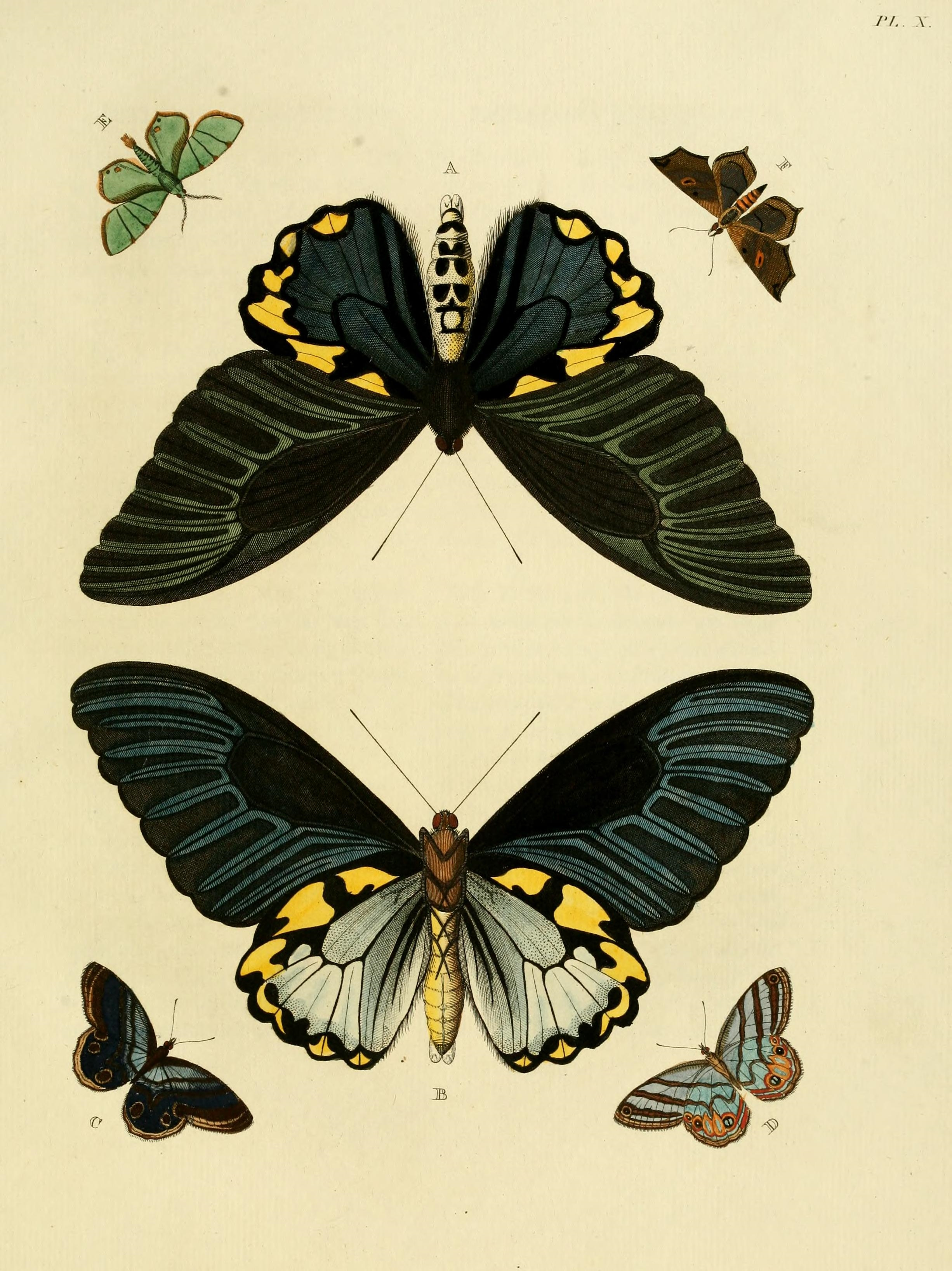 Plate X A, B "(Papilio) Hypolitus" ( = Troides hypolitus, male (female see plate XI File:Cramer&Stoll-uitlandsche kapellen vol. 1- plate 011.jpg see Funet ) C, D: "(Papilio) Herse" ( = Chloreuptychia herseis, see Funet, photo at E: "(Phalaena) Ilirias" (in index: "Ilyrias") ( = Eulepidotis ilirias, see [1], photos at Hétérocères de Guyane Française) F: "(Phalaena) Manto" ( = Euclystis manto, see Funet), photos at Barcode of Life Iconotype?